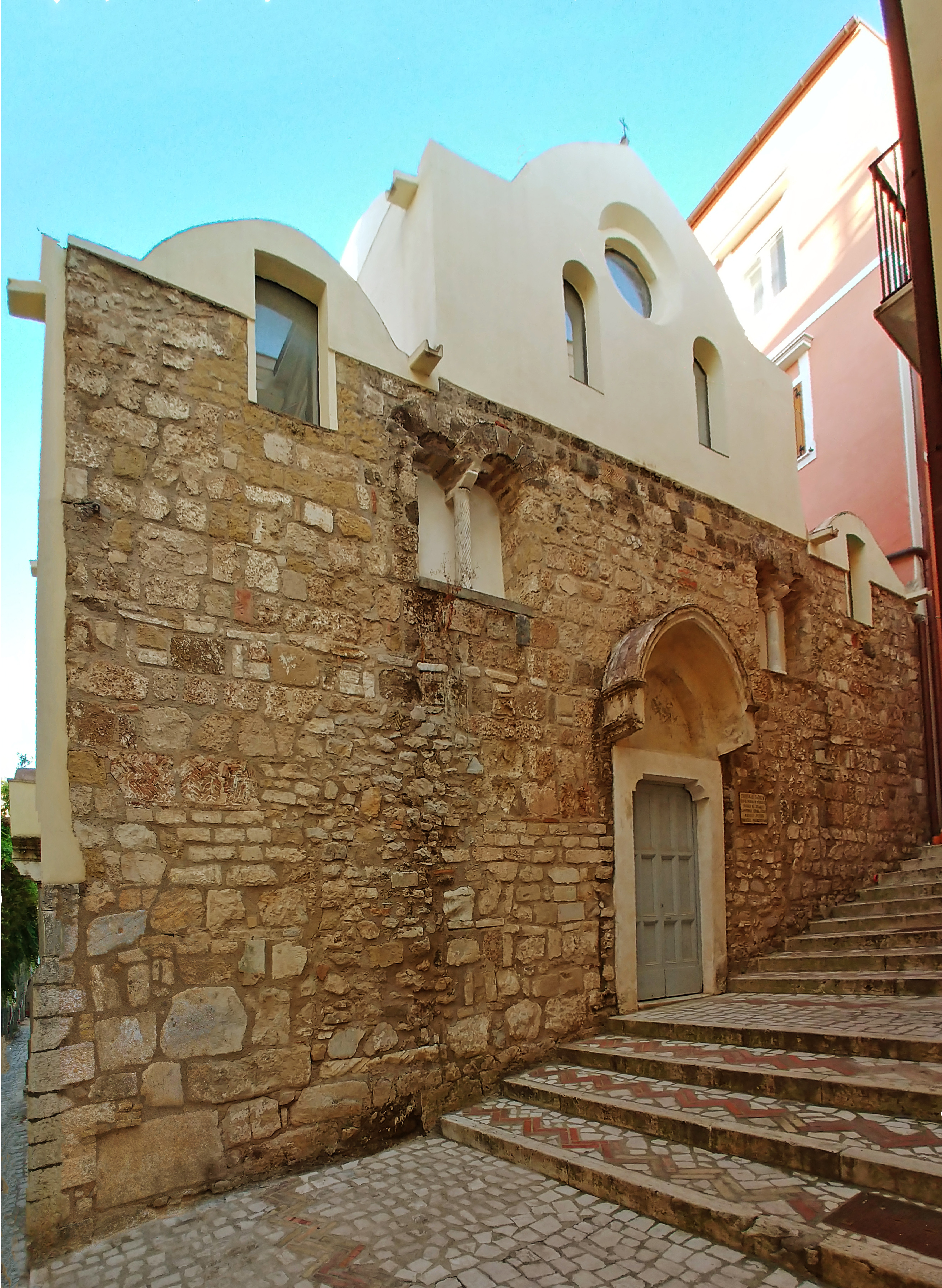 Facciata.